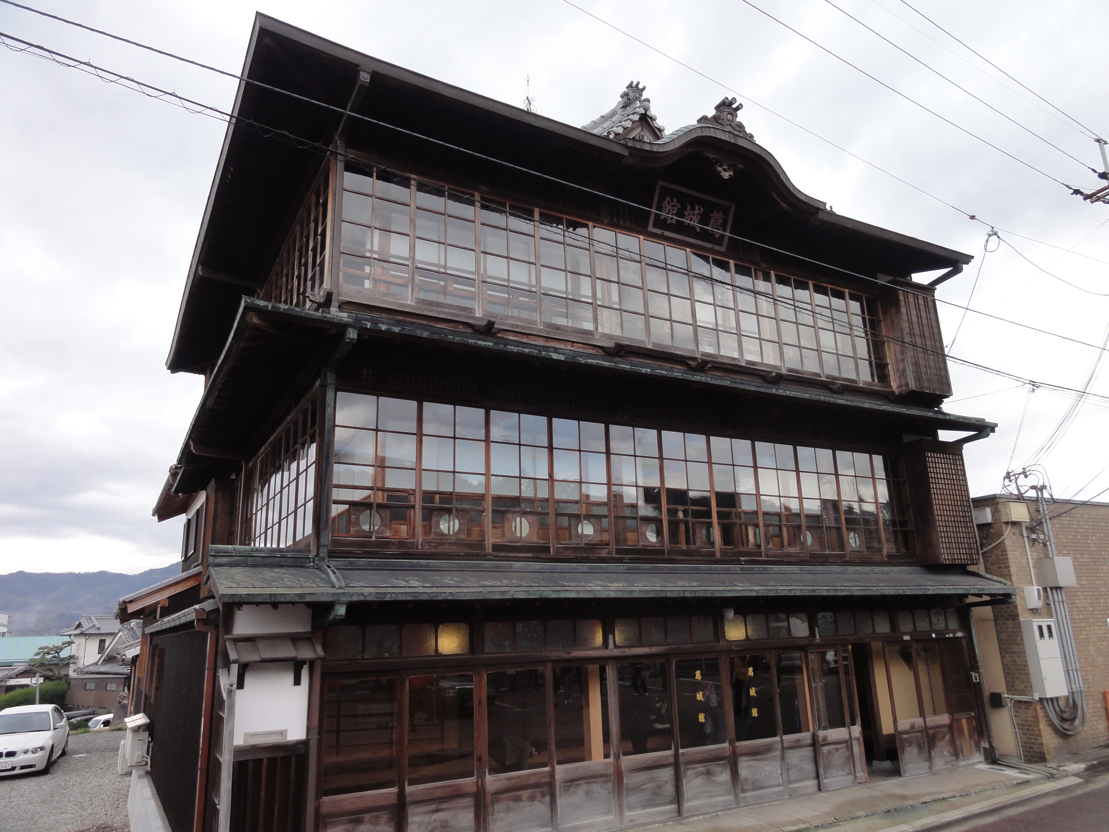 葛城館を高野口改札方向から撮影